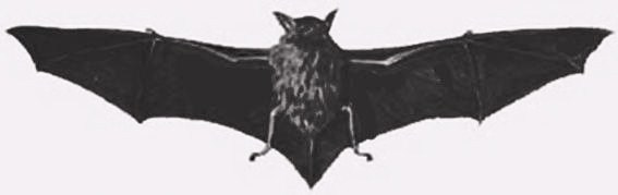 Murciélago orejas de raton (Myotis chiloencsis)